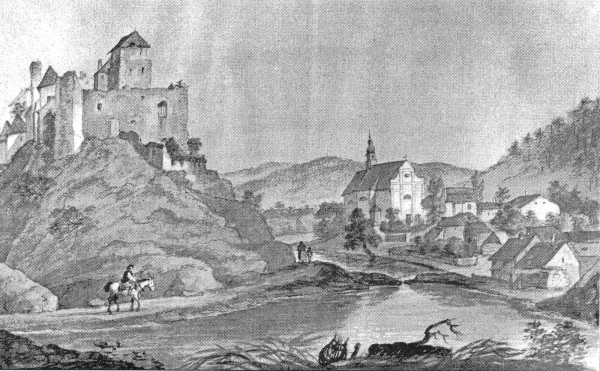 Hrad Černá Hora 1. třetina 19. století